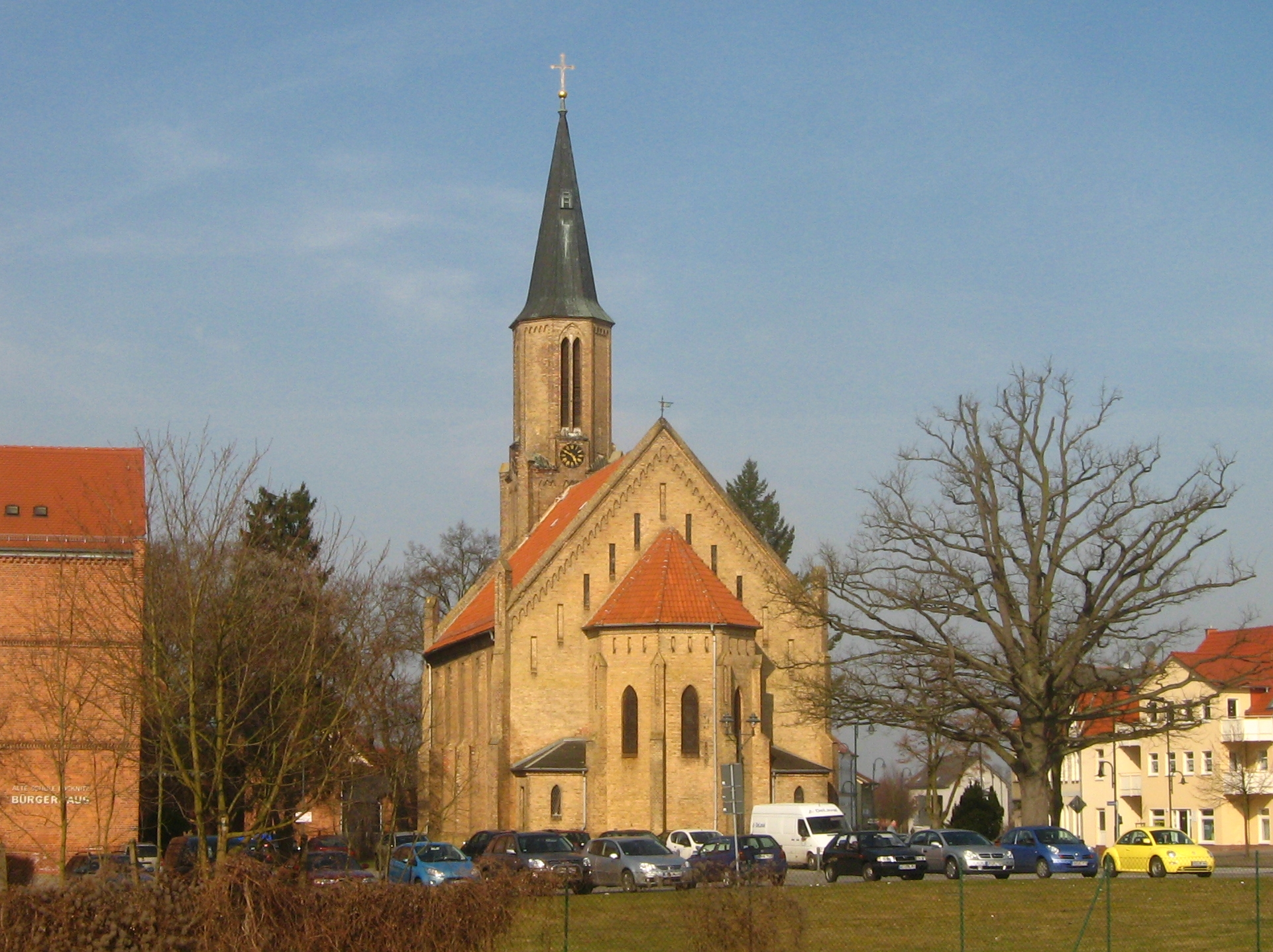 Neugotischer Kirchenbau in Löcknitz, 1871 als evangelische Kirche geweiht.